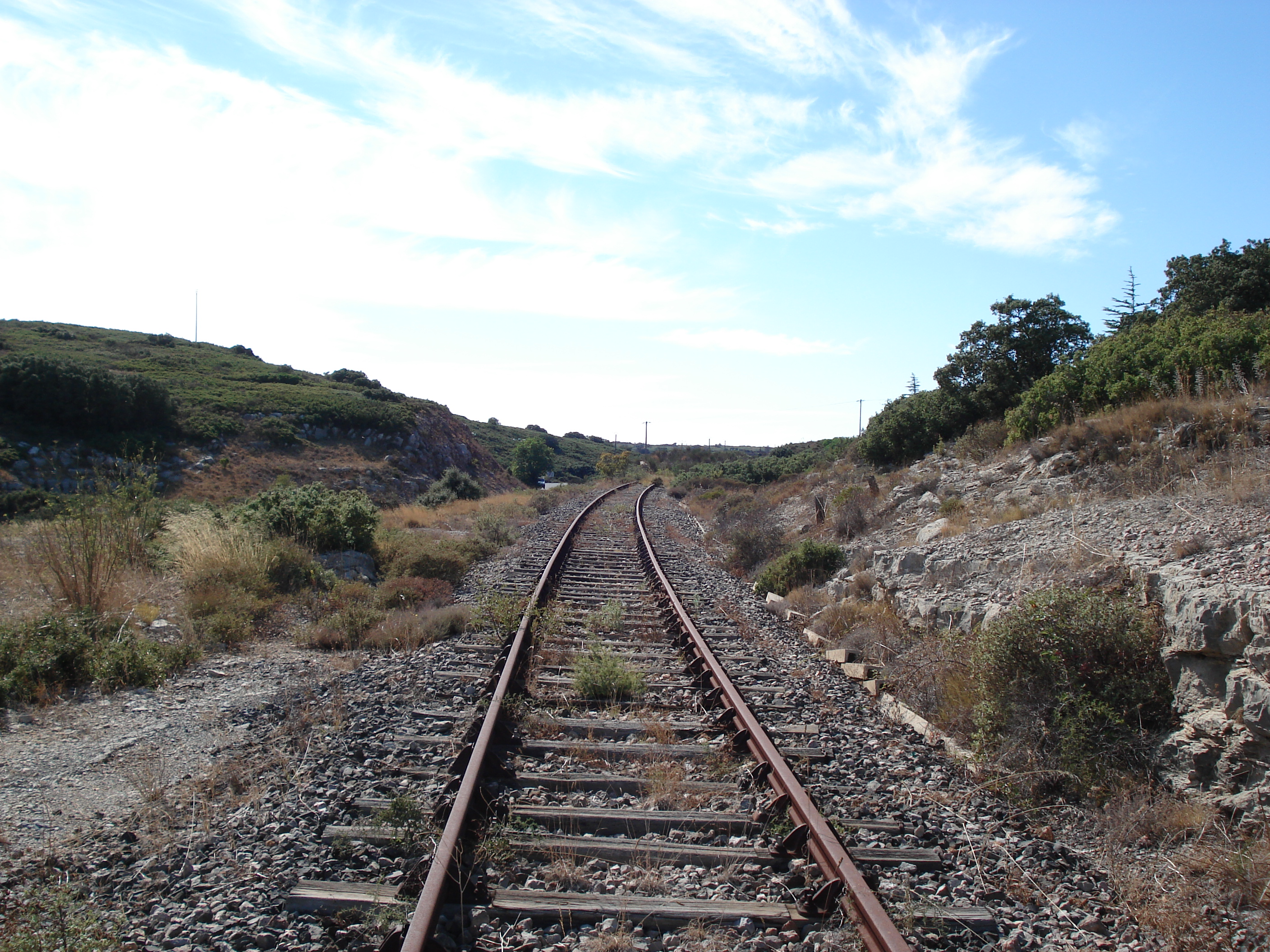 Quelques kilomètres après Montbazin, la ligne Montpellier - Paulhan (Hérault)